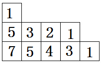 这是一个关于杨表勾长的图